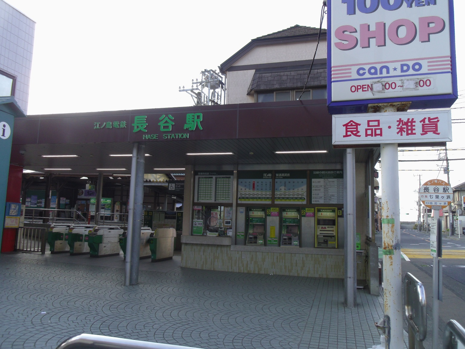 長谷駅の本屋(改札)側